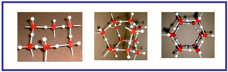 Hidrogeno loturen adibideak